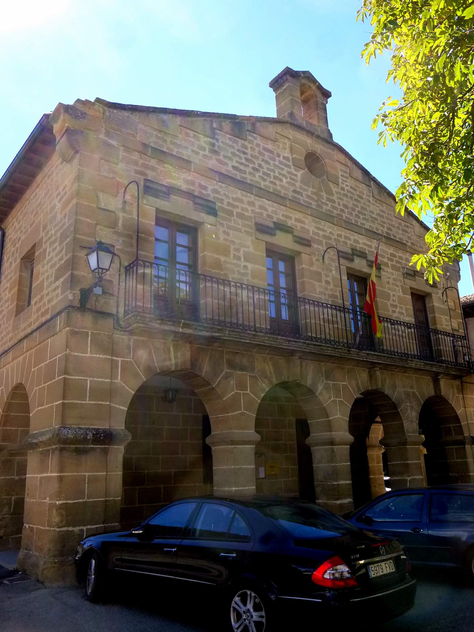 Ayuntamiento de Ollauri (La Rioja, España)